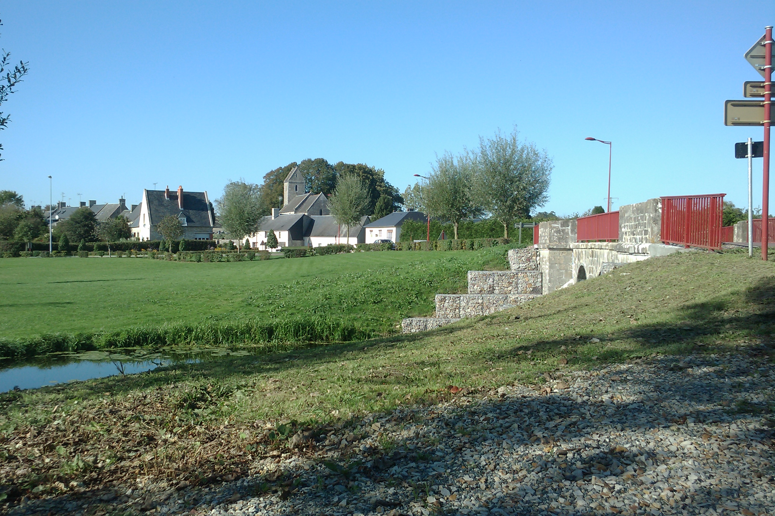 Vue de Baupte